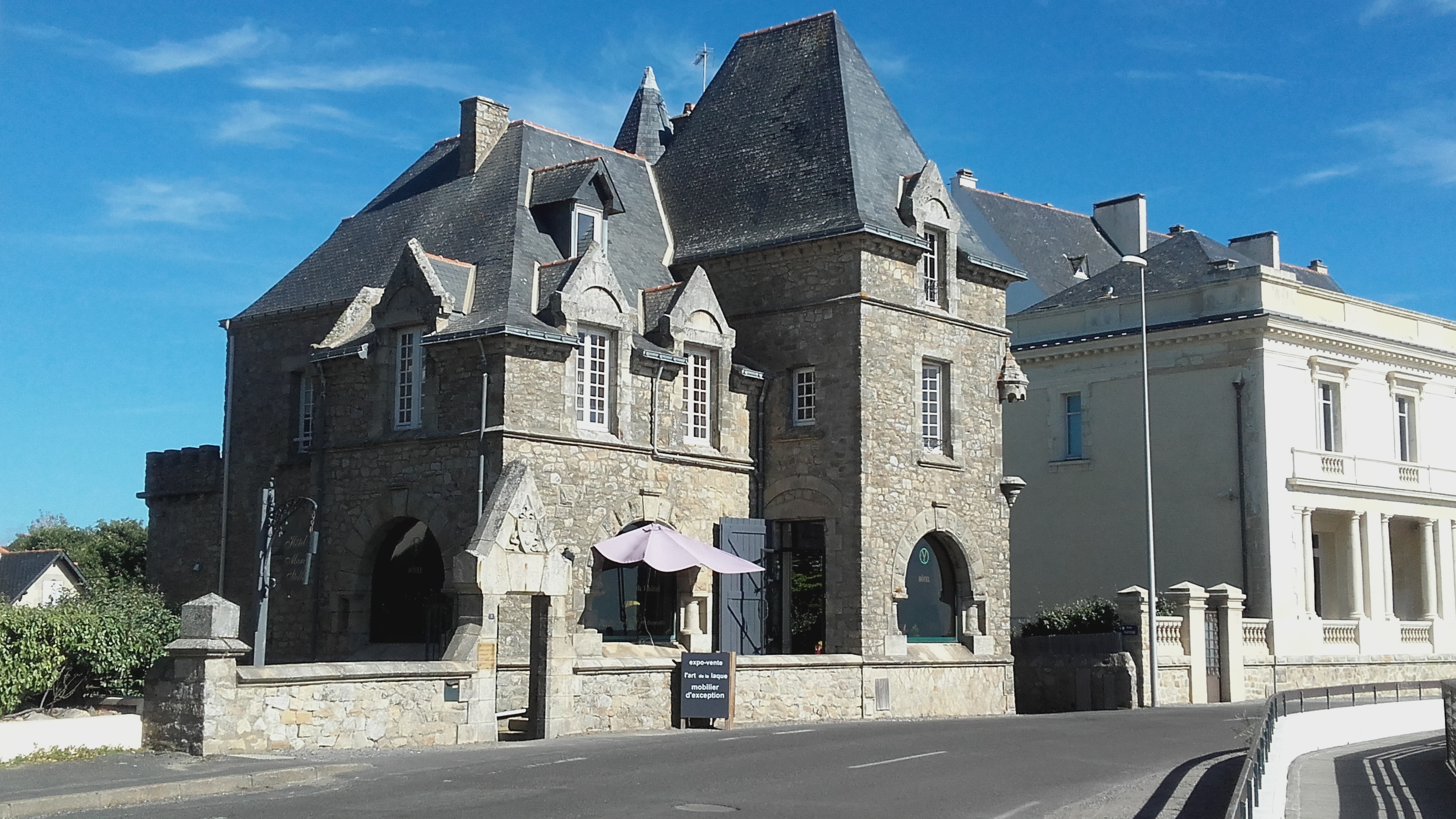 Villa Stella Maris, à Port Lin, commune du Croisic (Loire Atlantique, France)